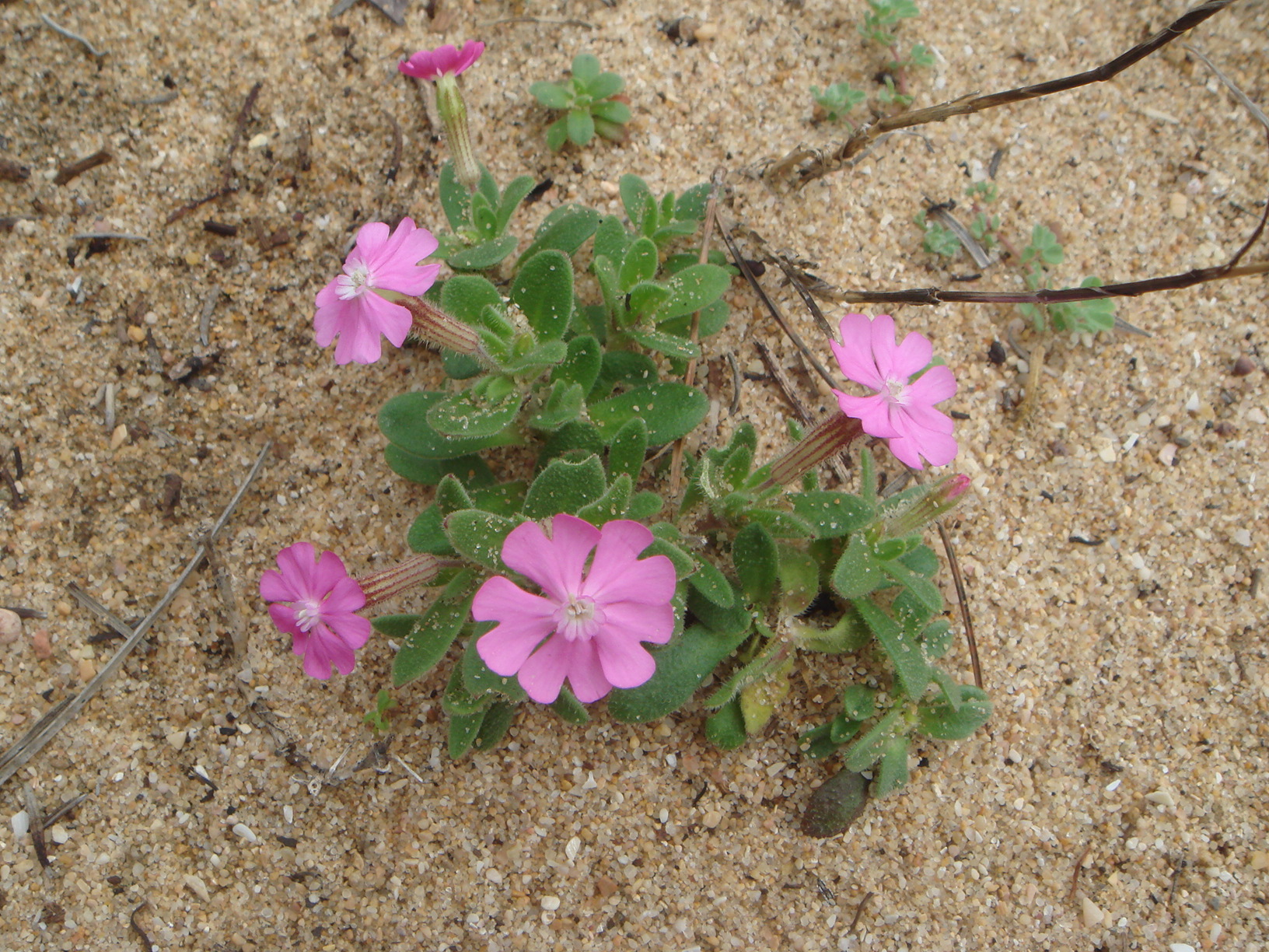 Silene littorea, Chiclana (Cádiz) España